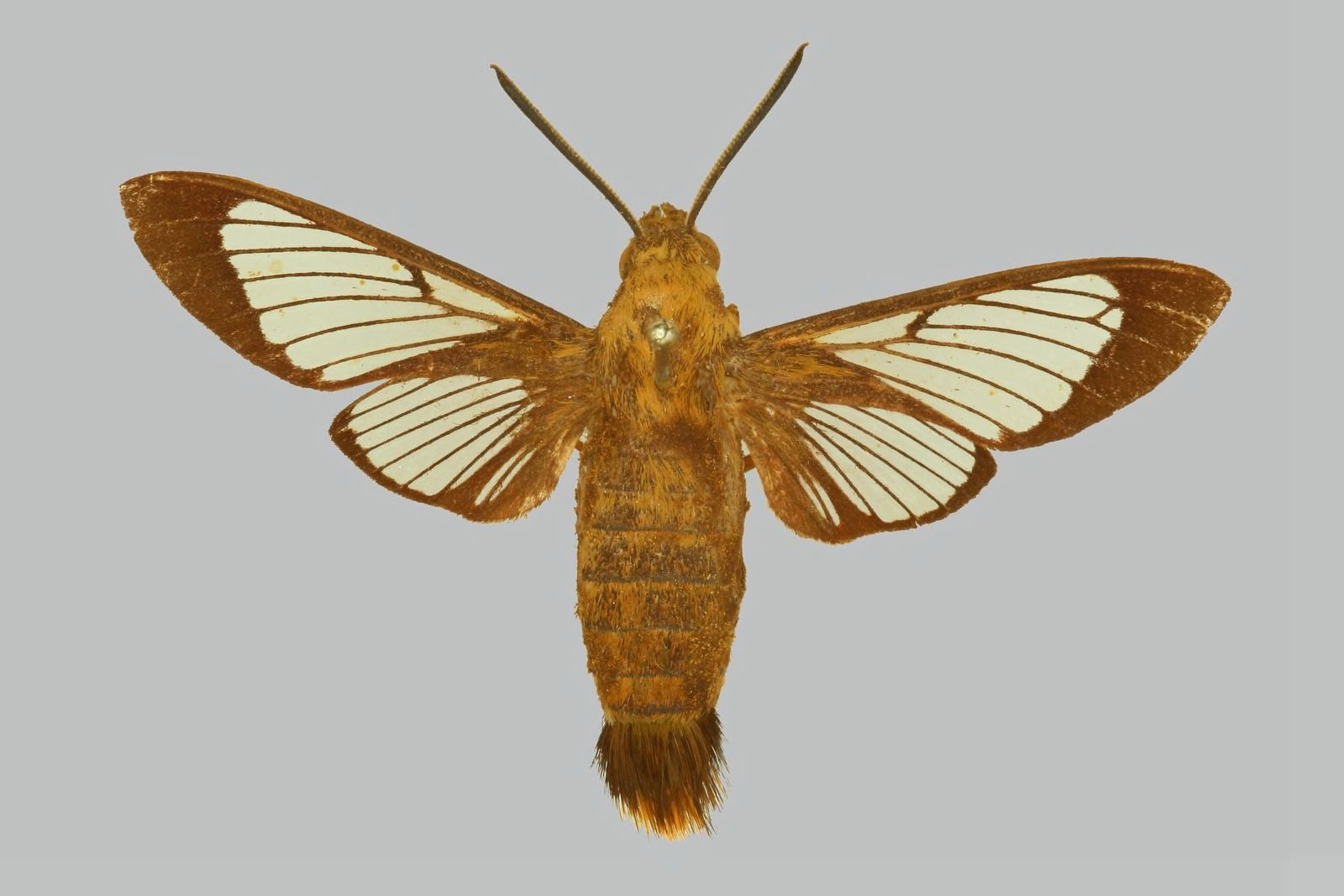 Hemaris venata Male upperside